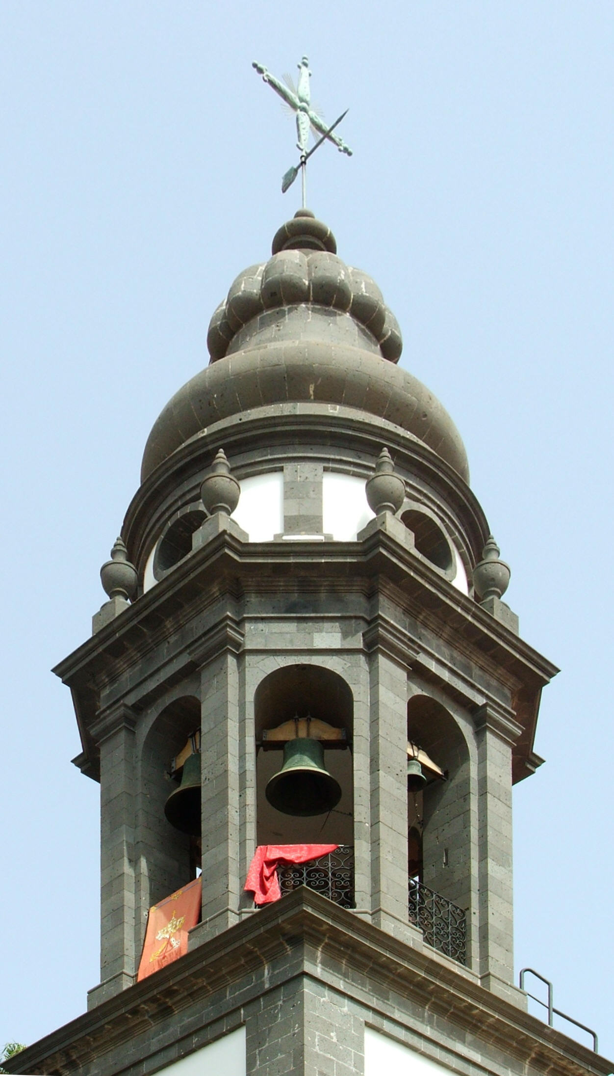 Torre sur de la Iglesia Catedral La Laguna